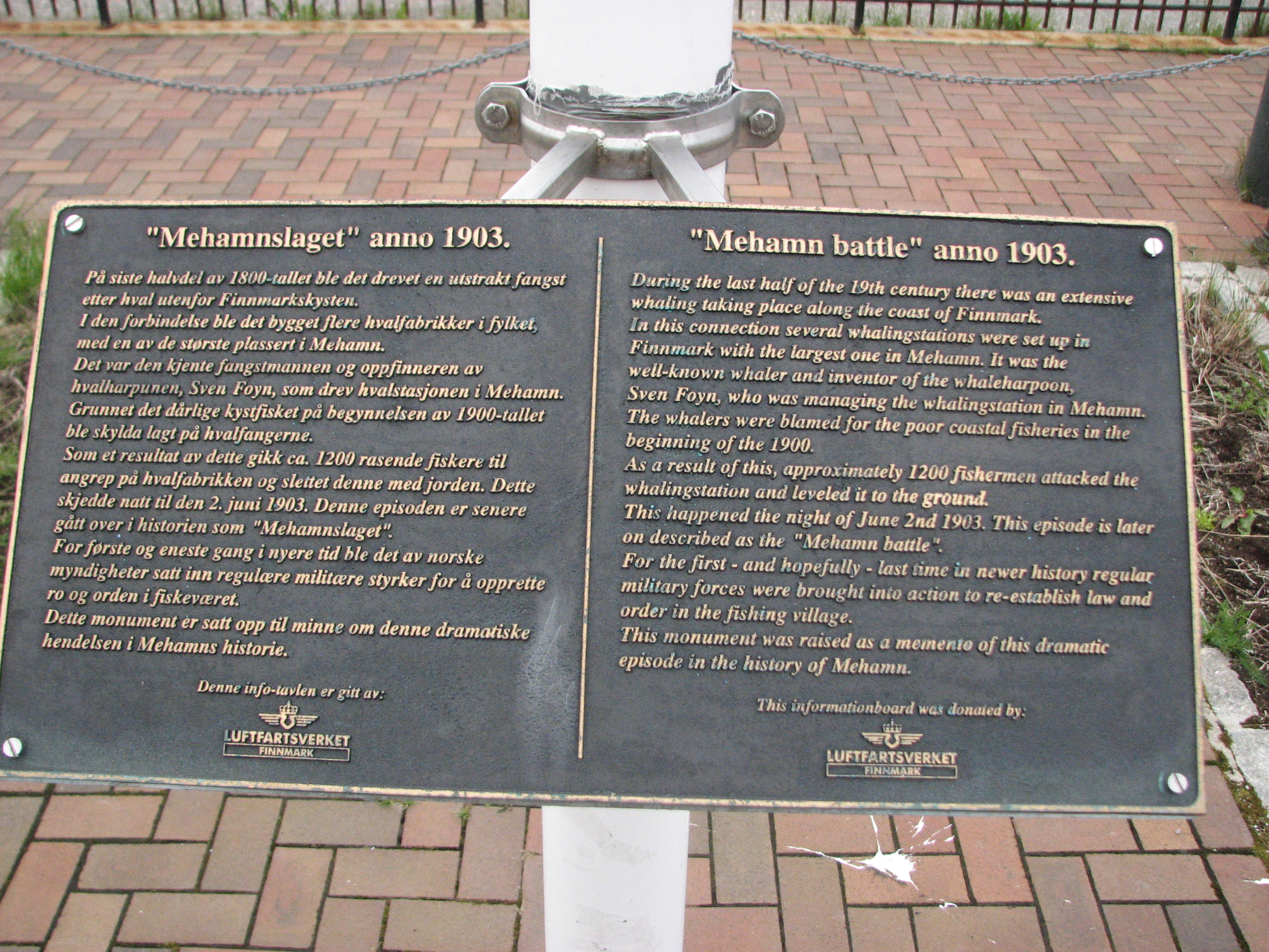 Mehamn, Finnmark, Norway "Mehamn battle" anno 1903